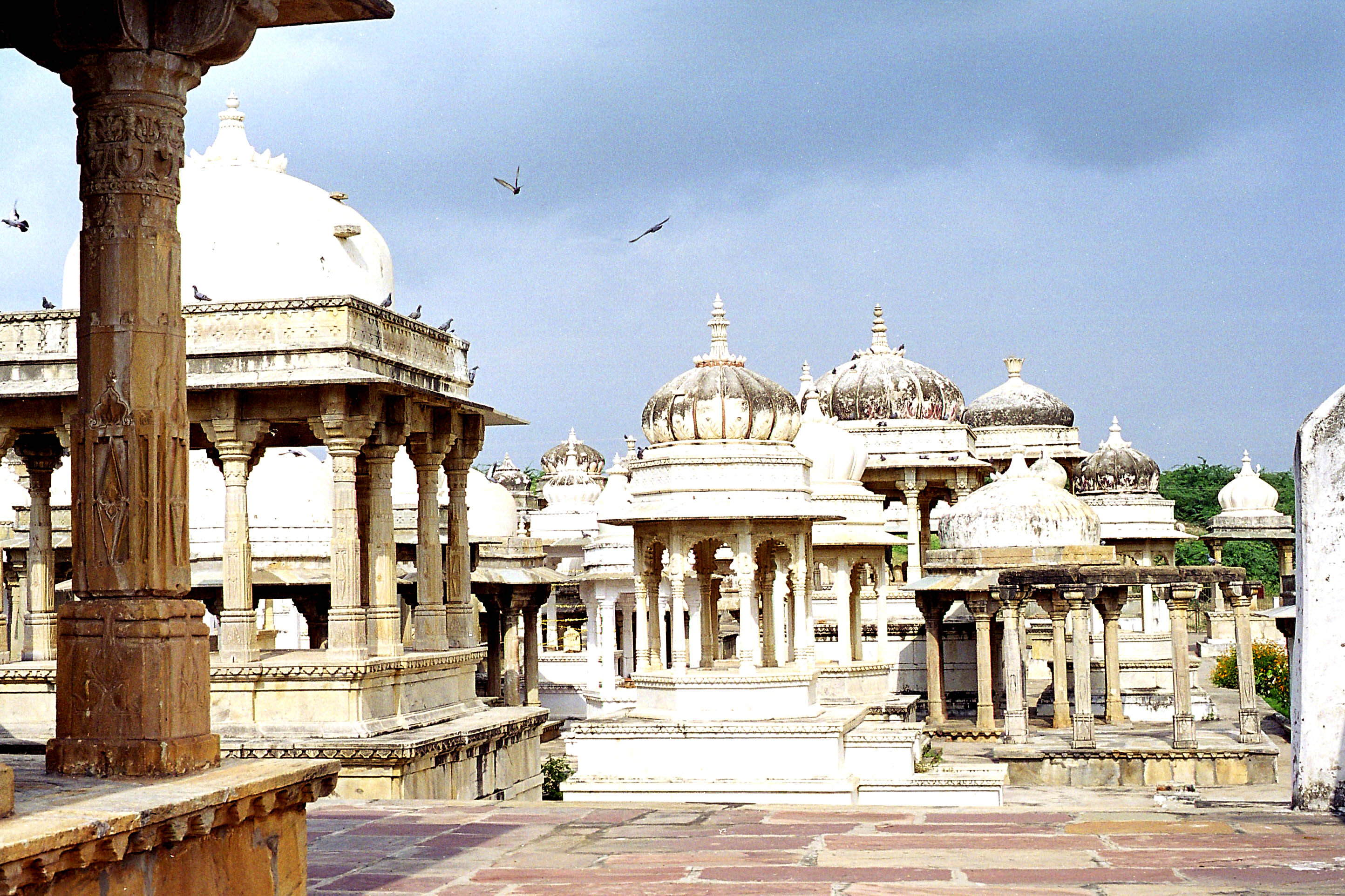 Cénotaphes des maharajas de Mewar, Ahar, Udaipur / Royal Cenotaphs, Ahar, Udaipur